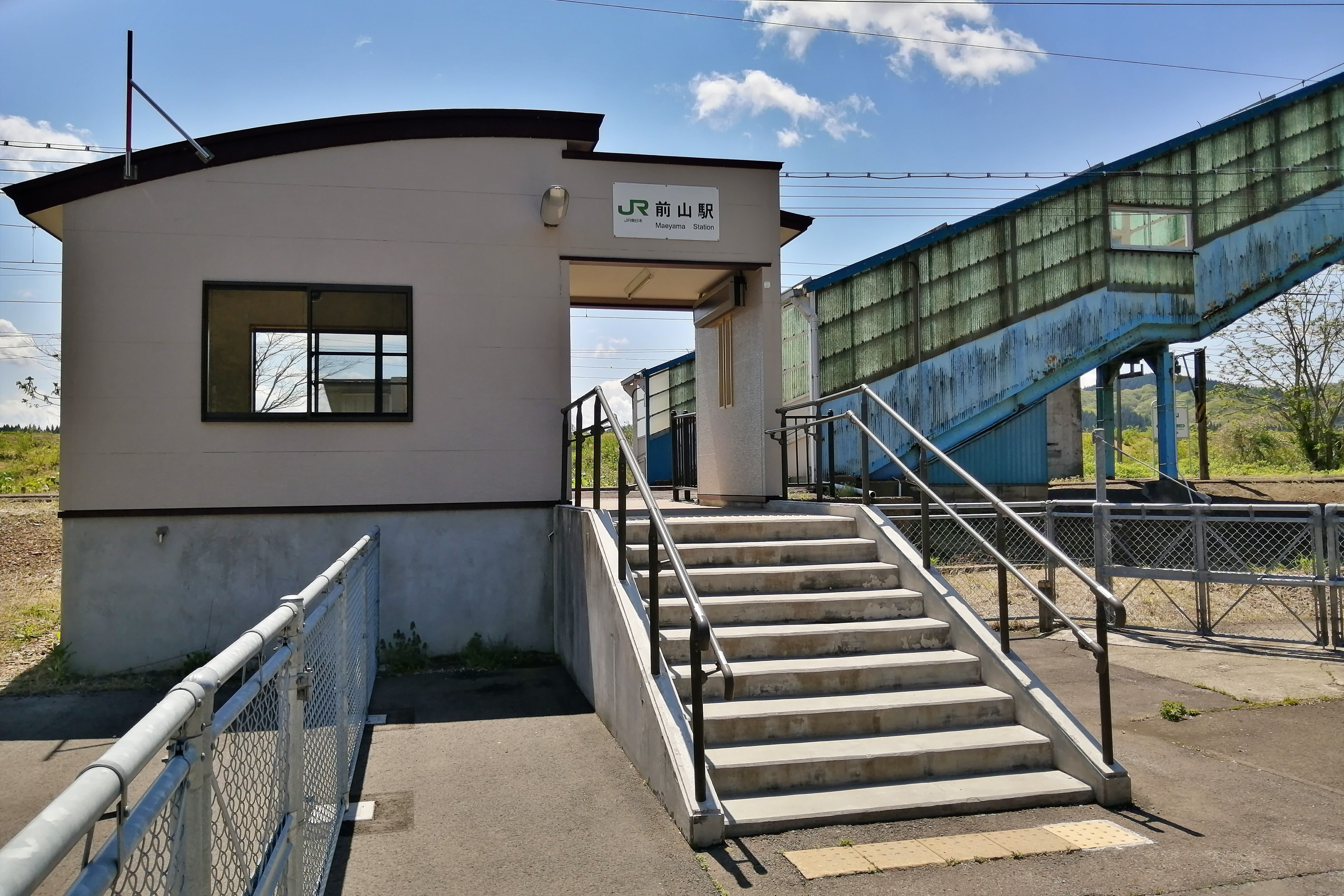 奥羽本線 前山駅-北秋田市前山